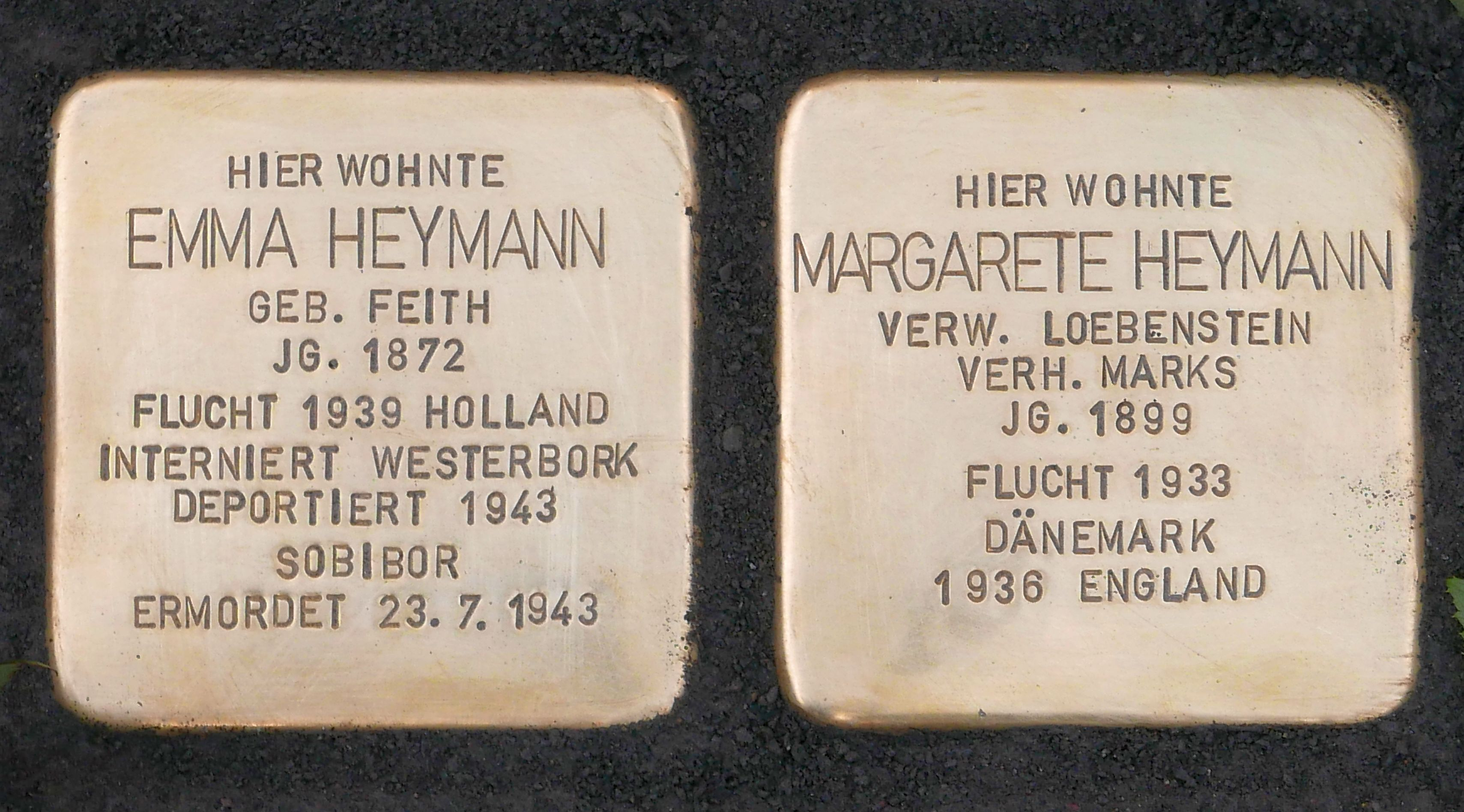 Stolpersteine Köln Kinkelstrasse 9 Verlegung am 11.09.2018: Stolpersteine für Emma und Margarete Heymann